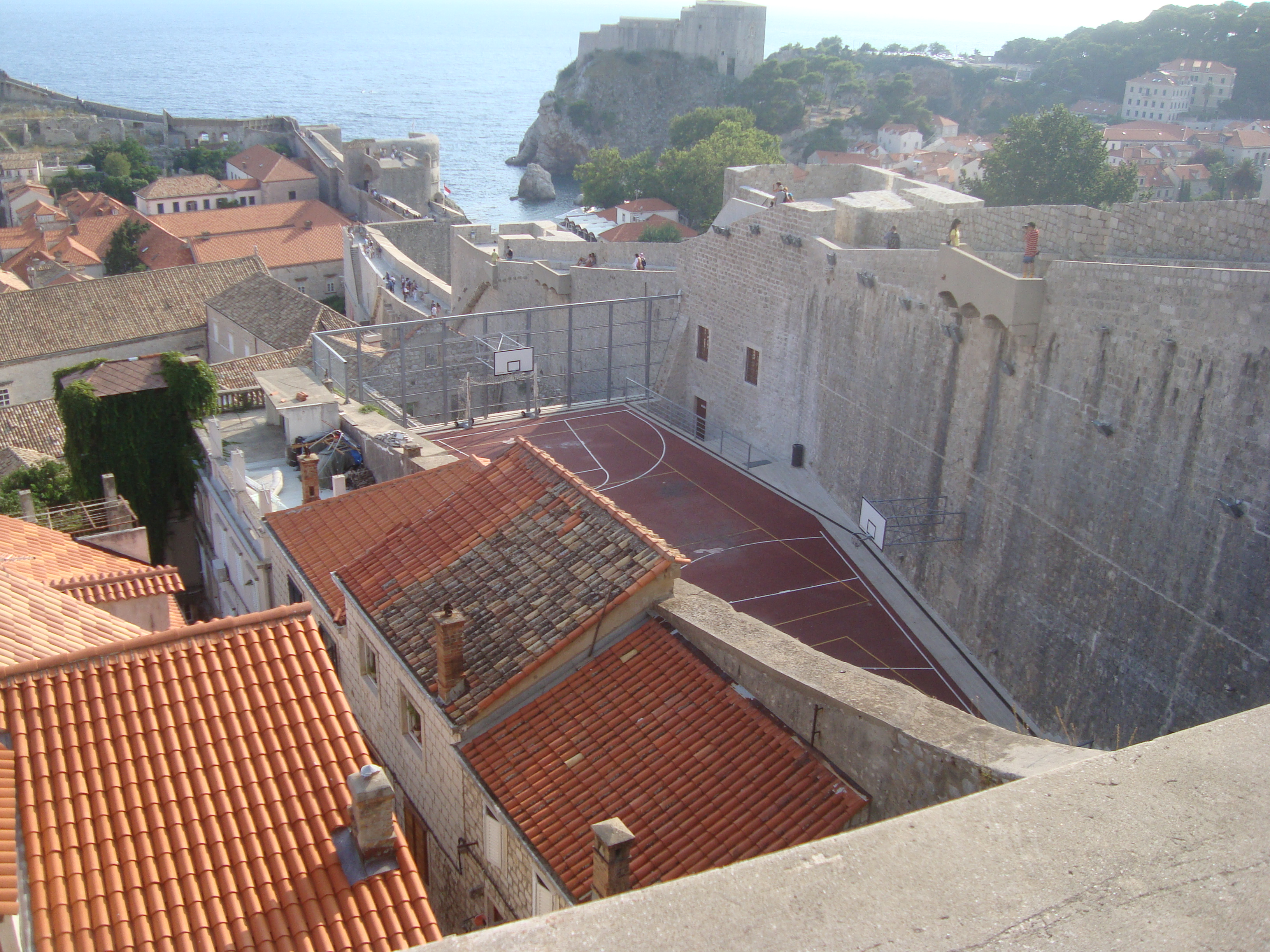 Terrain de basket-ball en contrebas intérieur des fortifications de Dubrovnik en Croatie